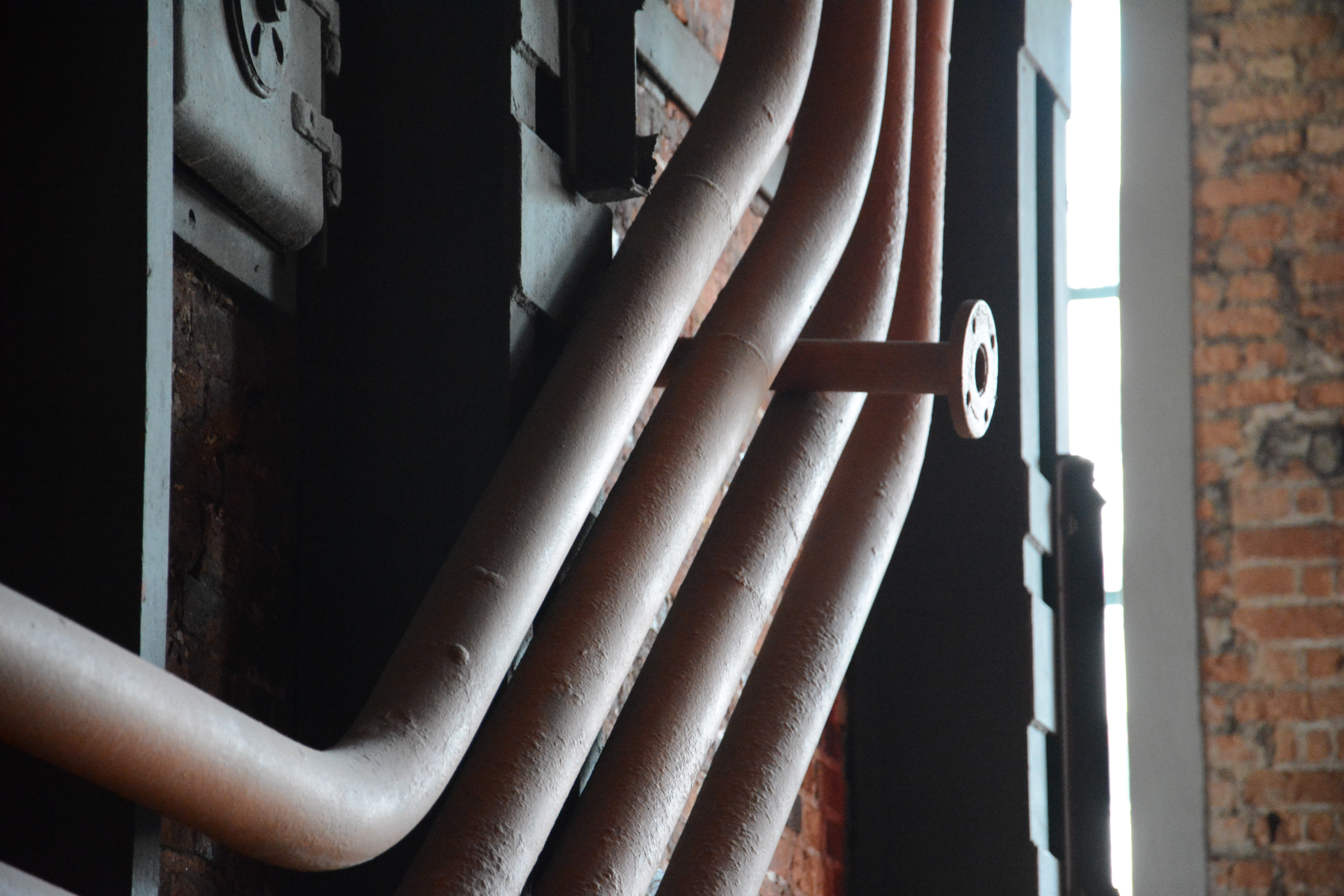 (Barra Funda - São Paulo - SP